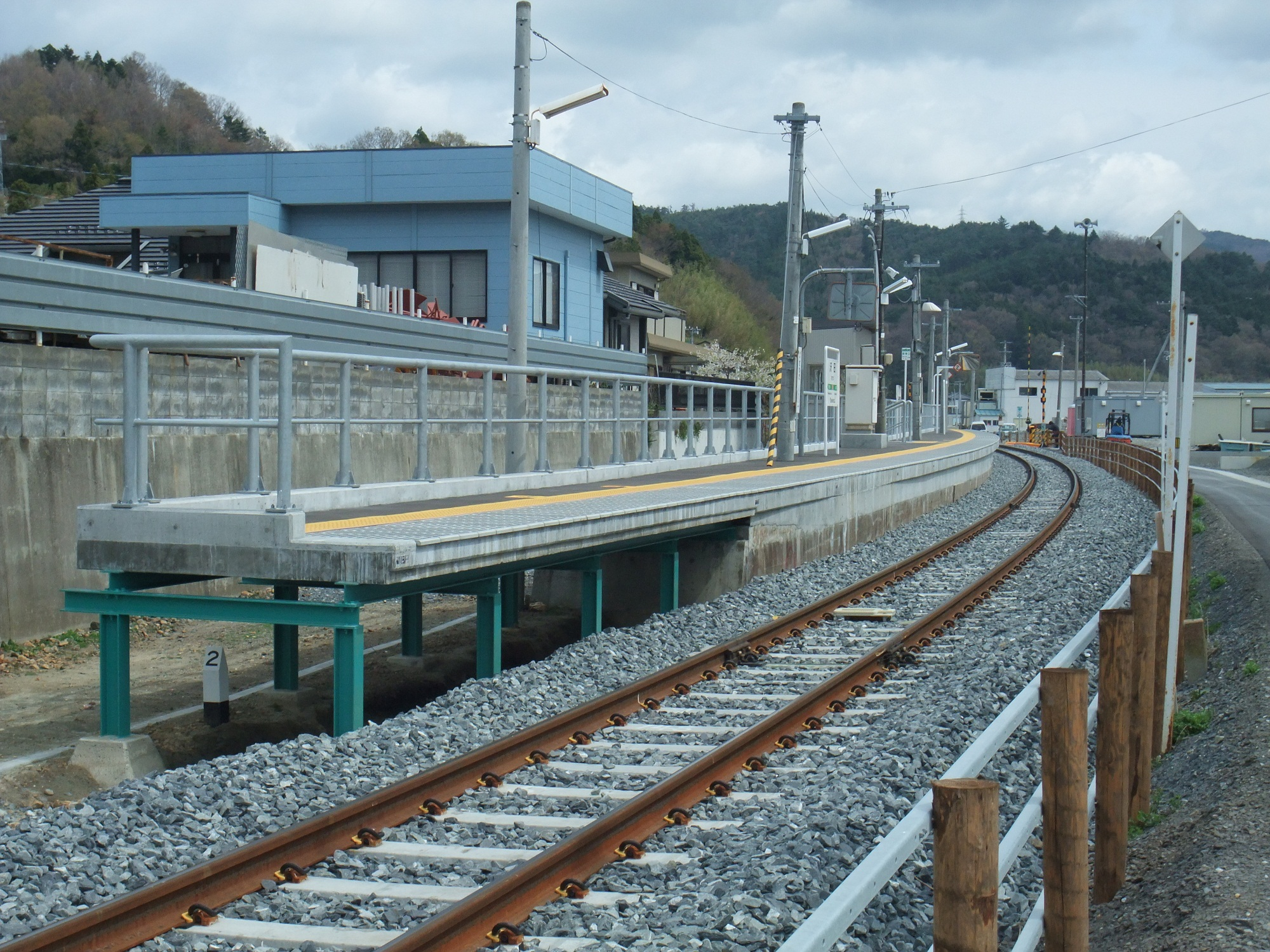 石巻線沢田駅ホーム